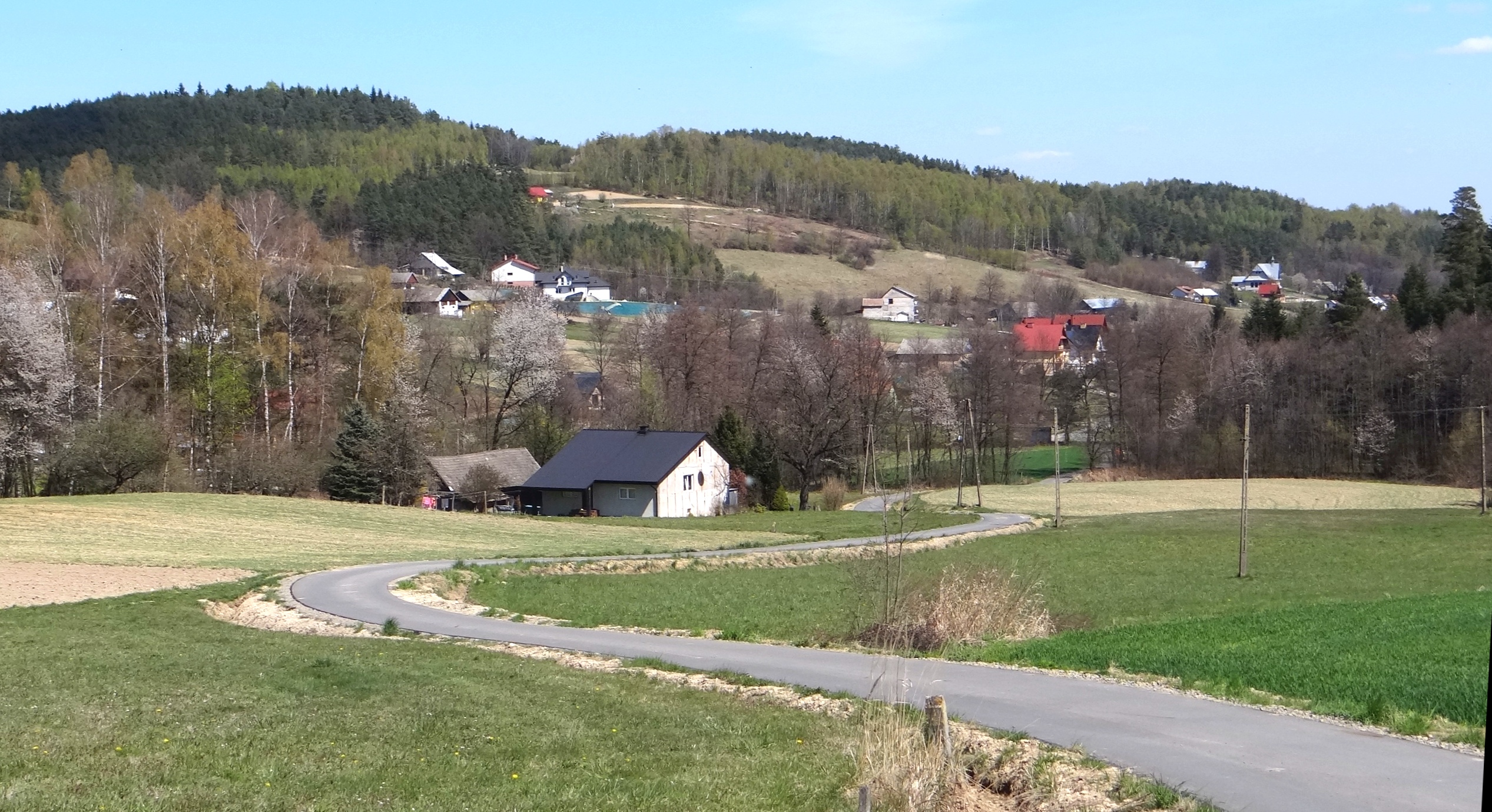 Siekierczyna (powiat tarnowski)